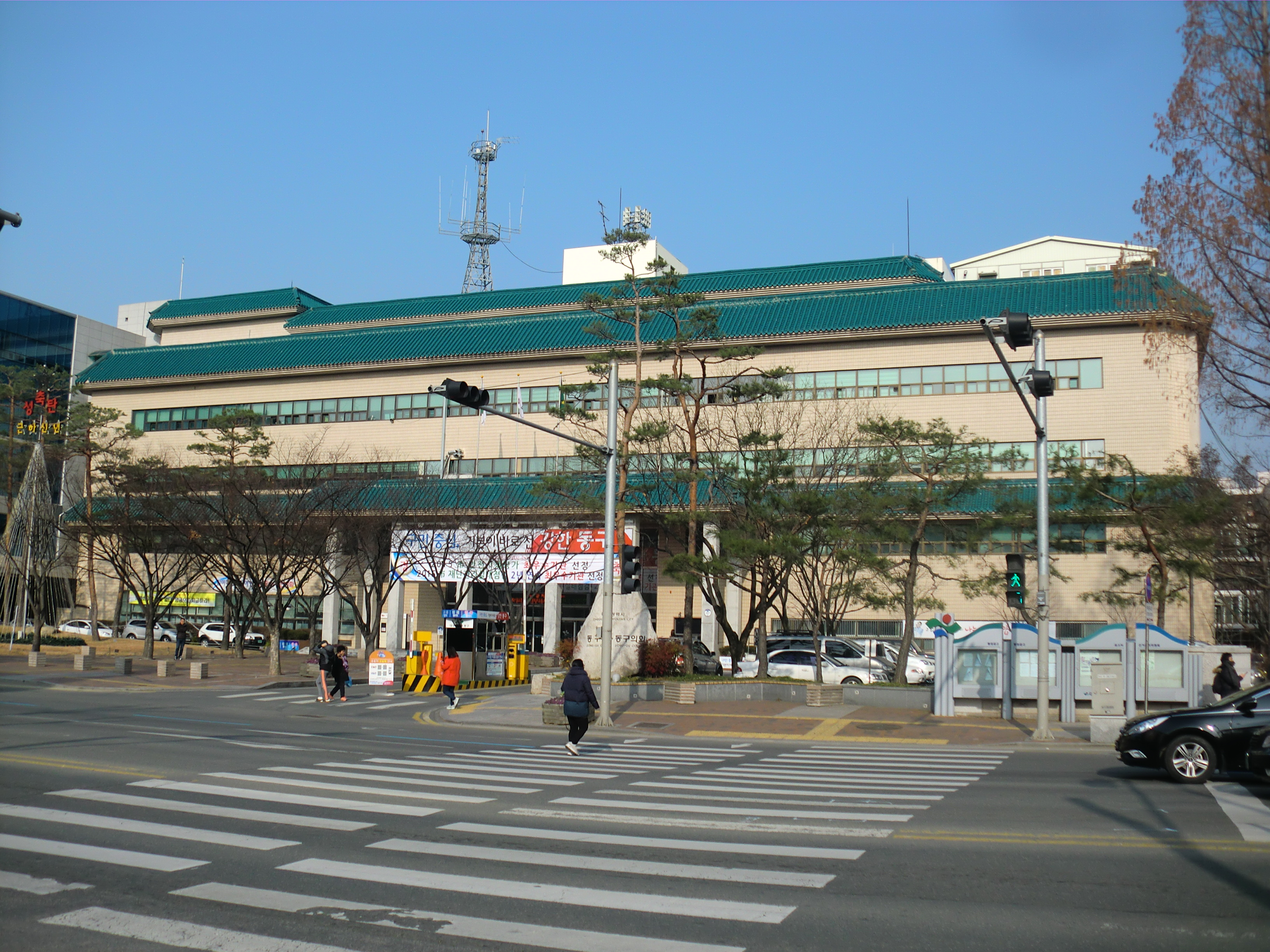 대구광역시 동구에 있는 동구청